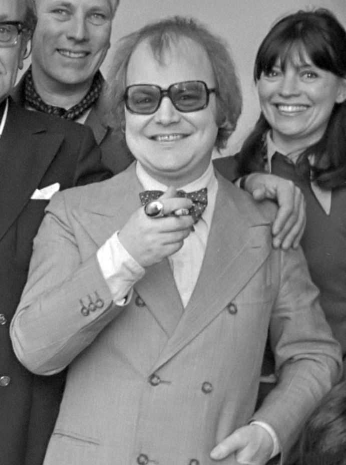 Persconferentie te Amsterdam i.v.m. Carel Briels' nieuwe produktie "Elckerlyc". Jerome Reehuis